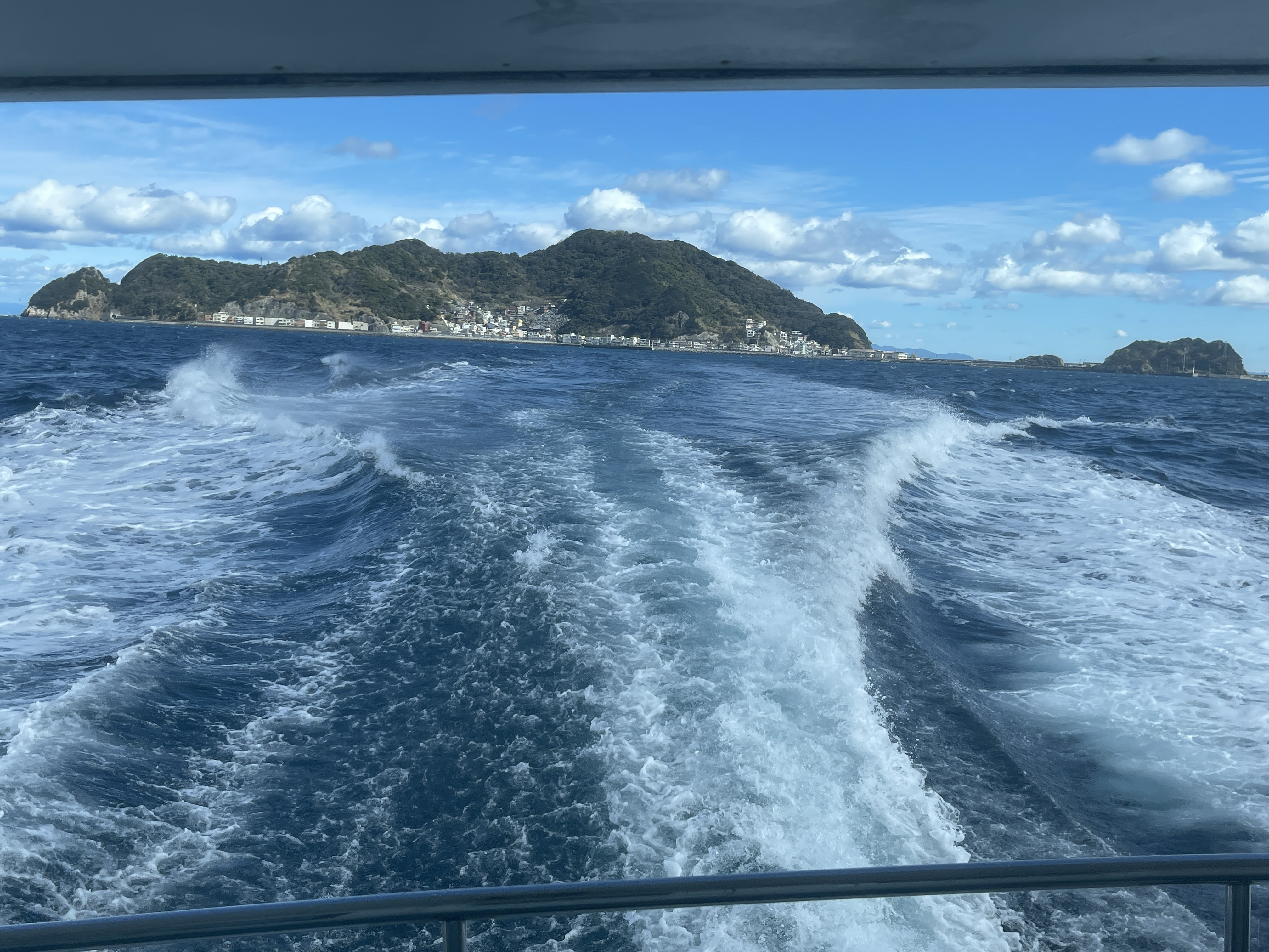 保戸島2013